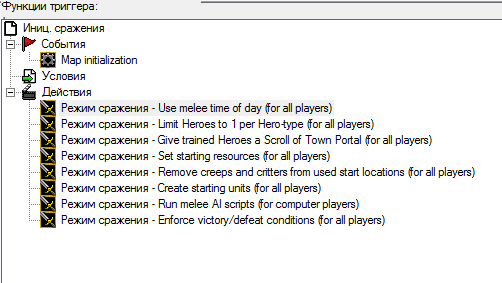 Стандартный триггер инициализации сражения в Редакторе Триггерв (Русская версия).